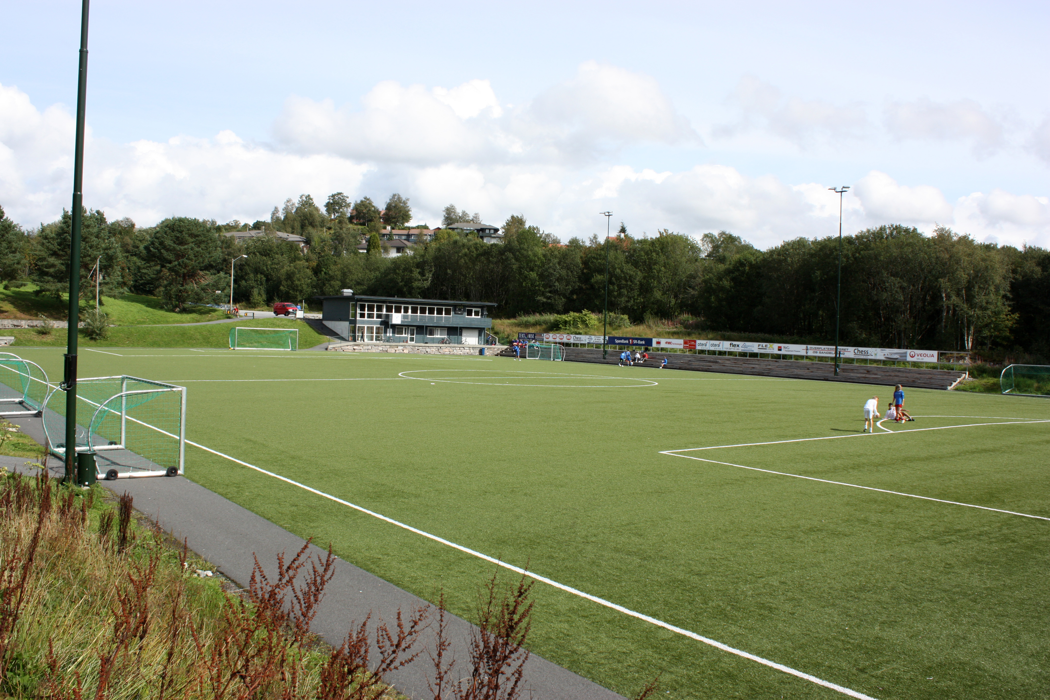 Slåtthaug idrettsanlegg, Fana, Bergen. August 2009.